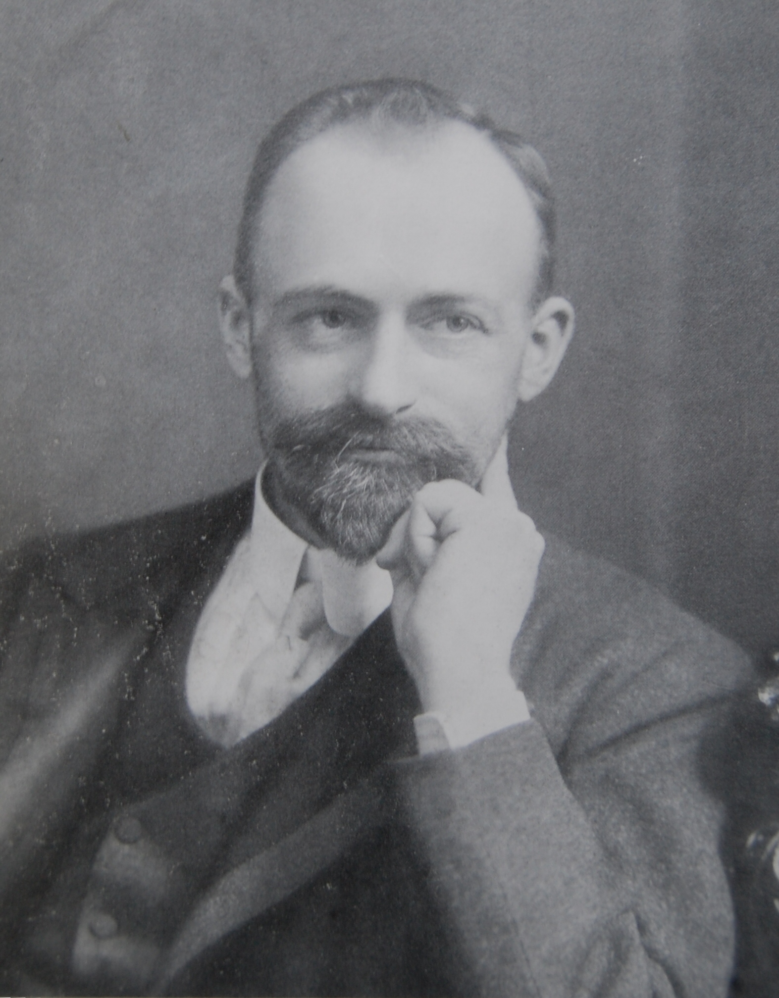 Portrait